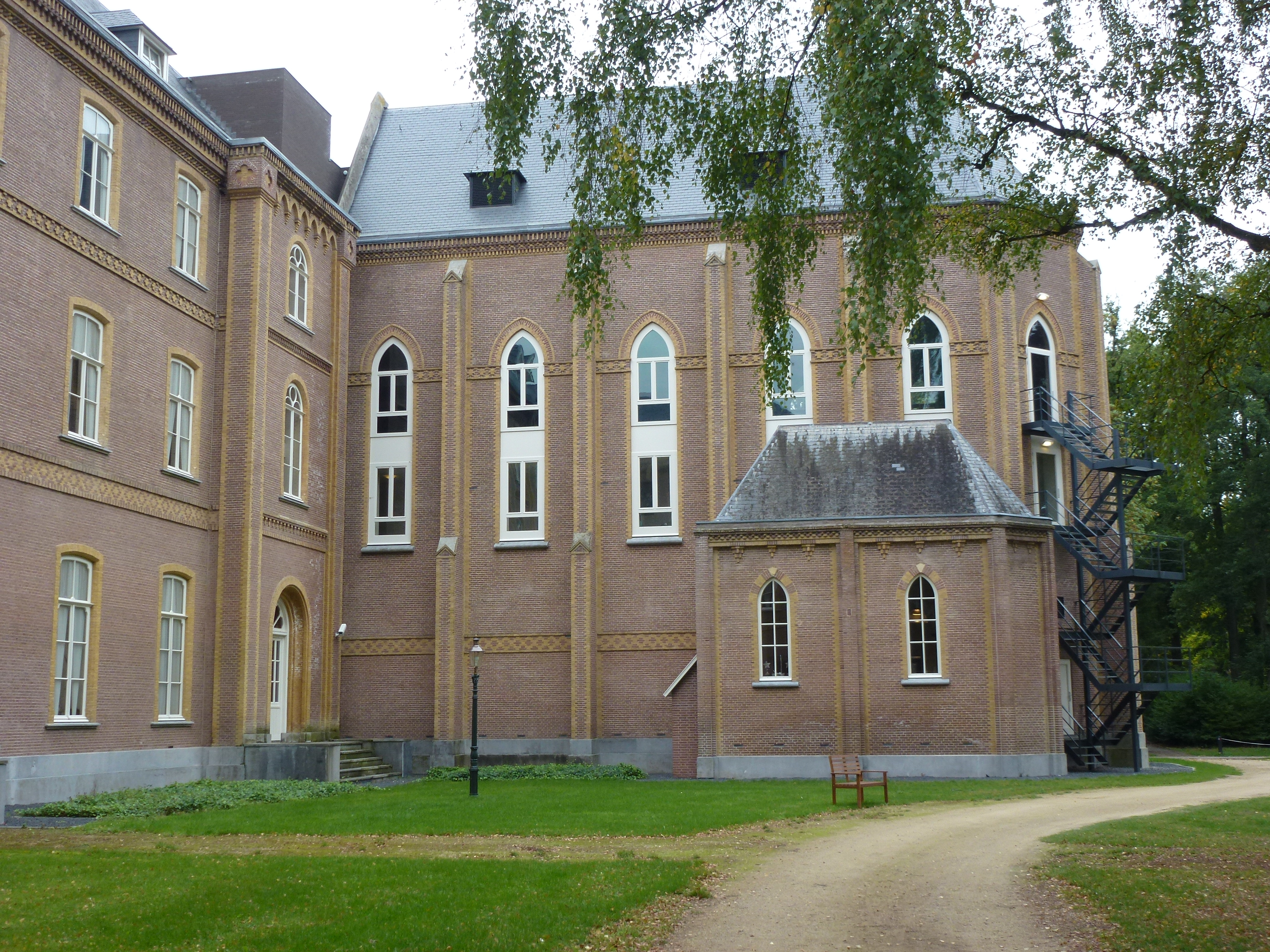 Velp Rijksmonument 514138 Mariendaal (Bronckhorst) na restauratie, kapel